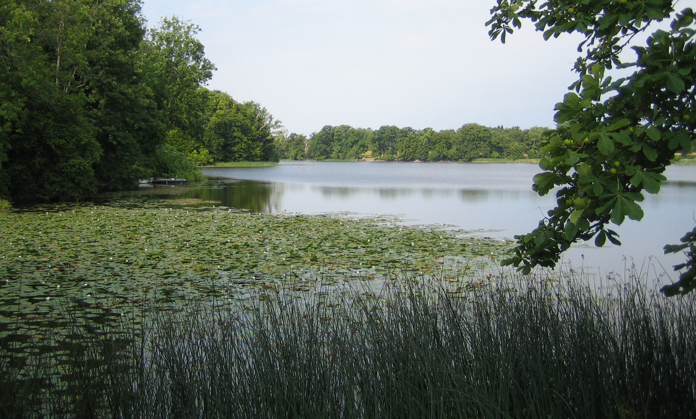 Häckebergasjön in Skåne, Sweden